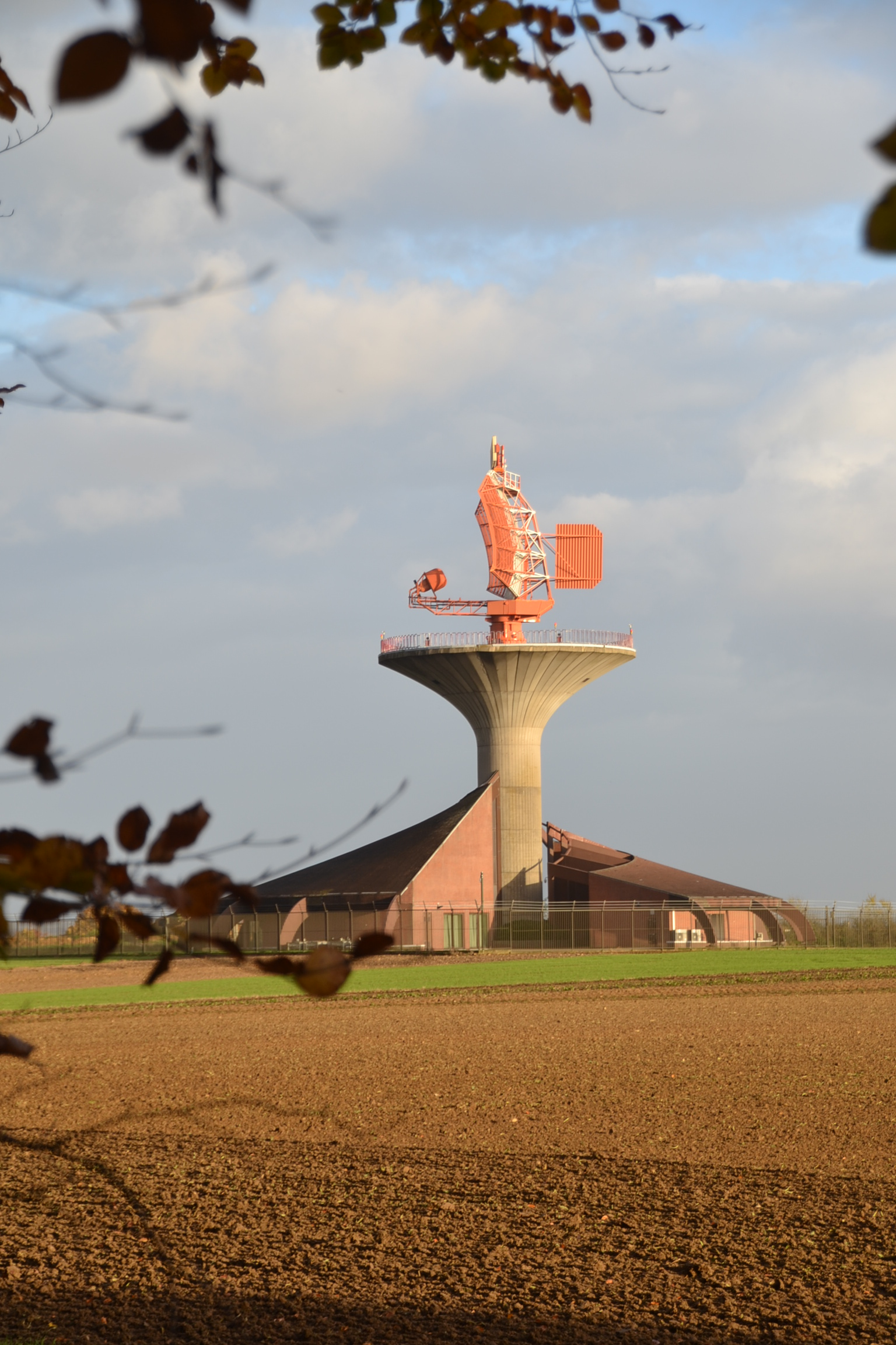 Radar station of Bertem